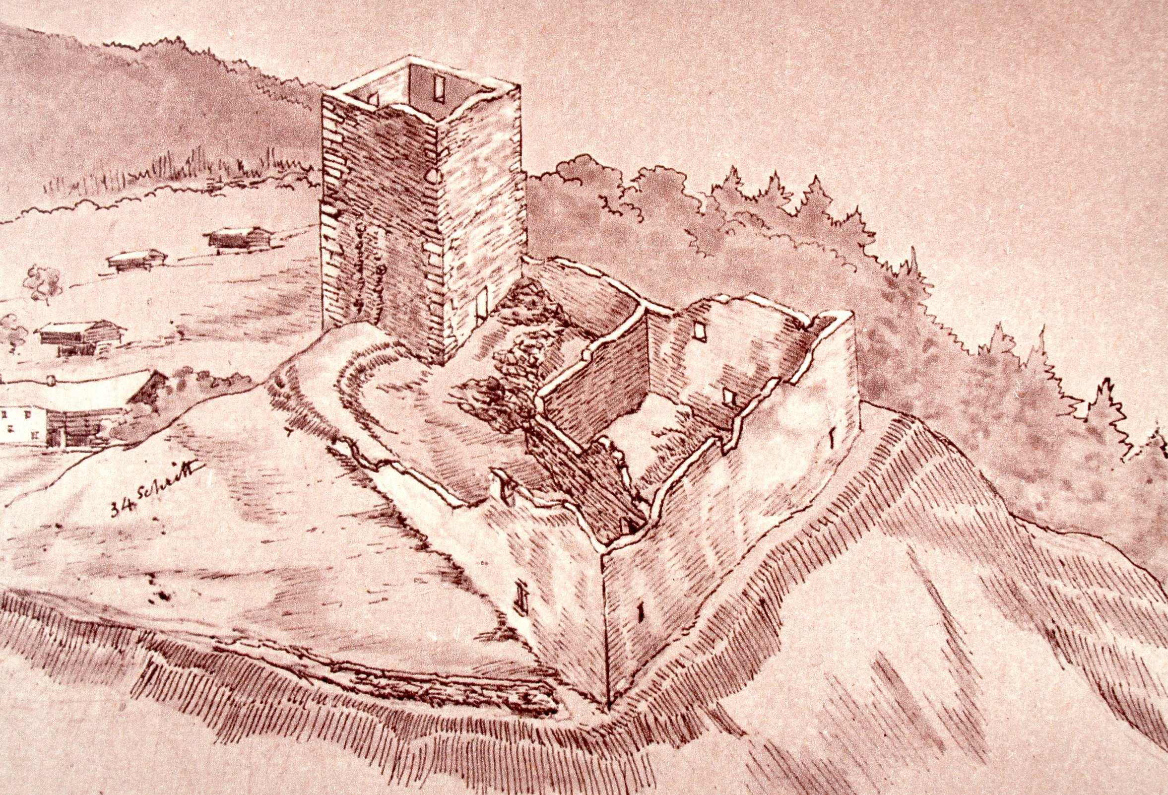 Strahlegg von Nordost. Zeichnung von J.R. Rahn 1892